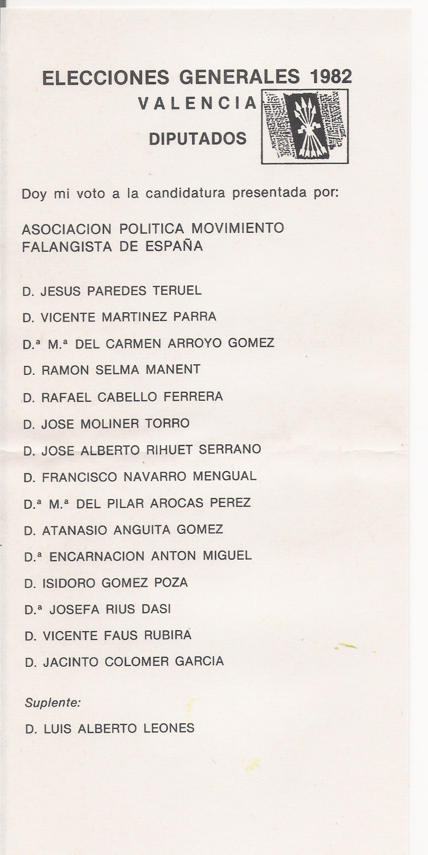 Papeleta electoral del Movimiento Falangista de España al Congreso por Valencia en 1982.